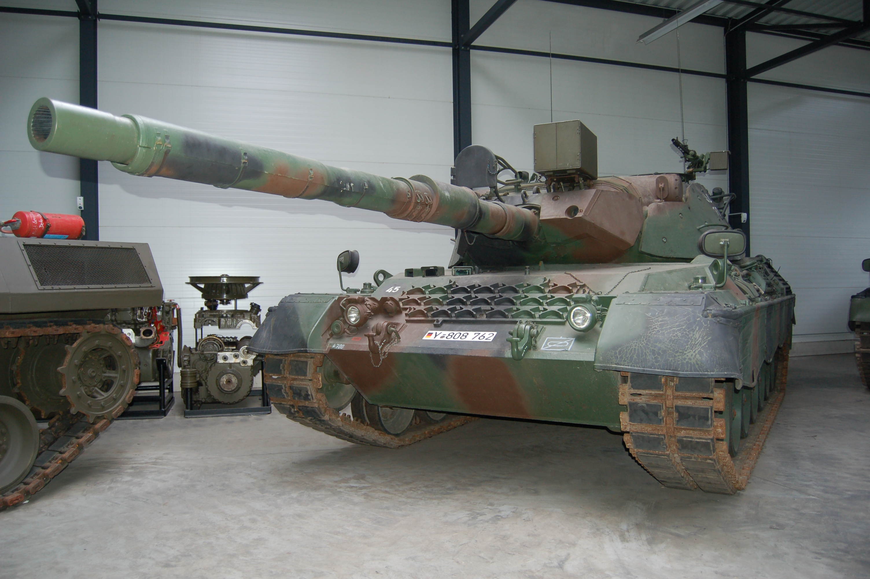 Mittlerer Kampfpanzer "Leopard 1 A1 A4" Besatzung: 4 Soldaten Gewicht: 42,4 Tonnen Motorleistung: 610 kW (830 PS) Bewaffnung: 1 Bordkanone 105 mm L/51, sowie Blenden u. Flieger-Abw-MG, Kaliber 7,62 mm Besonderheiten: Waffenstabilisierungsanlage, Nachtkampffähig, Unterwasserfähig, ABC-Schutz, Turmzusatzpanzerung und Funkgeräte SEM 80/90 Kampfwertsteigerung: 1975 - 1977 Stückzahl: 1.845